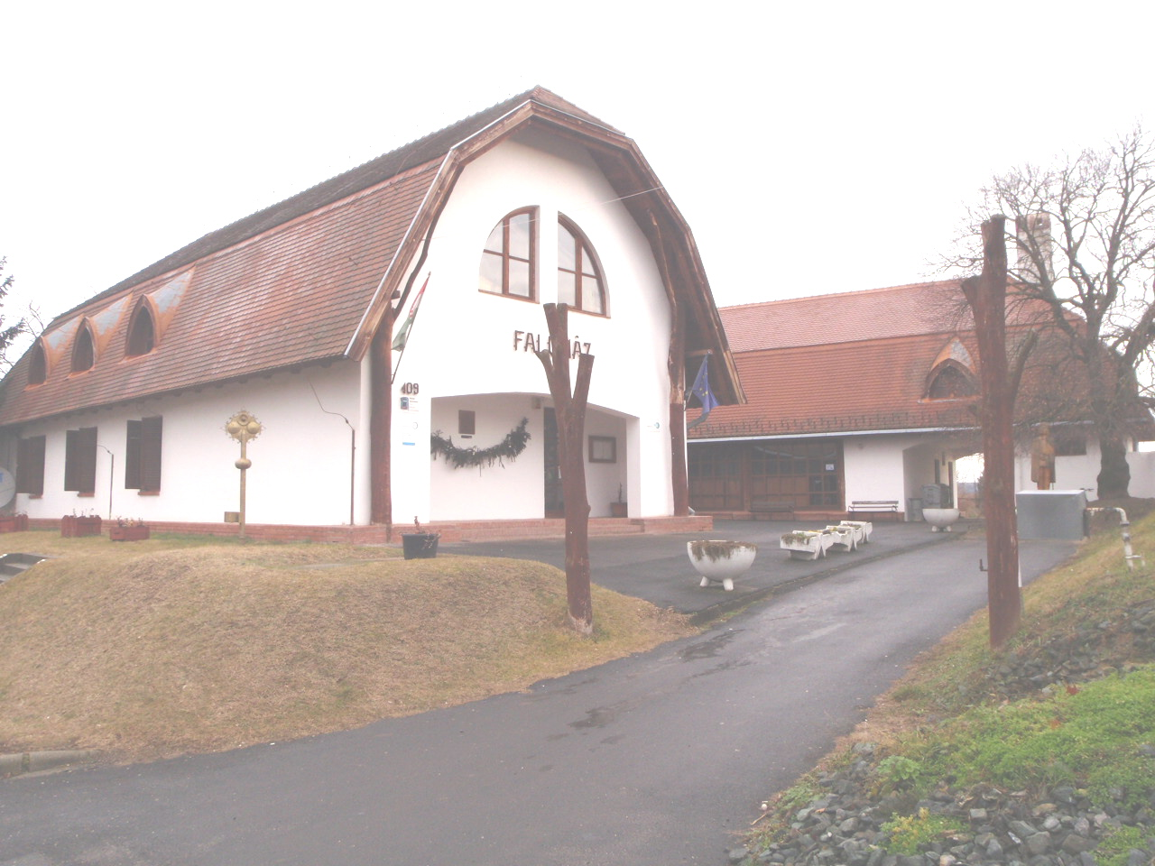 Kulturhaus Győrvár